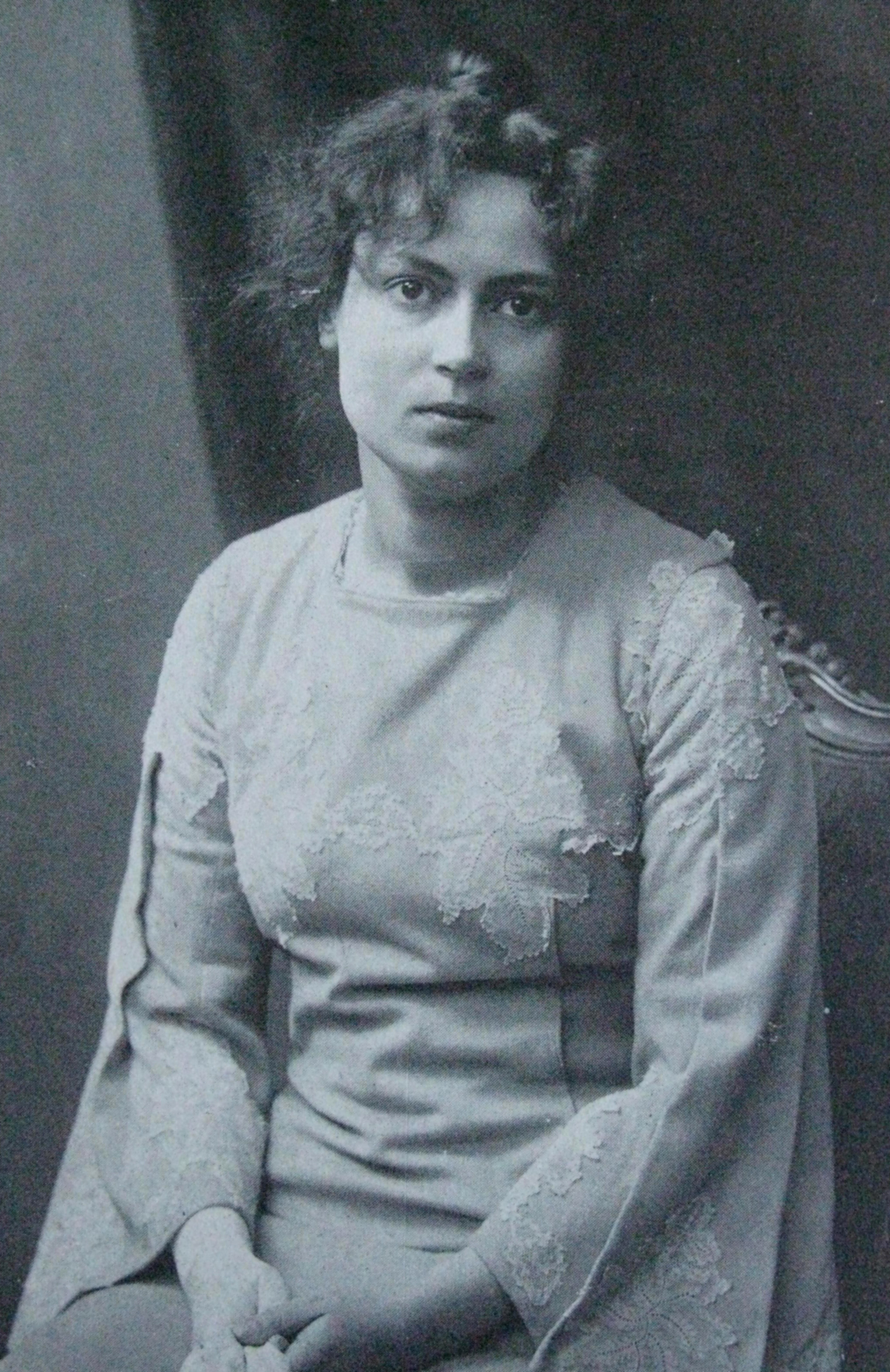 Kirjailija Eino Leinon ensimmäinen vaimo Freya Schoultz (1880–1951).